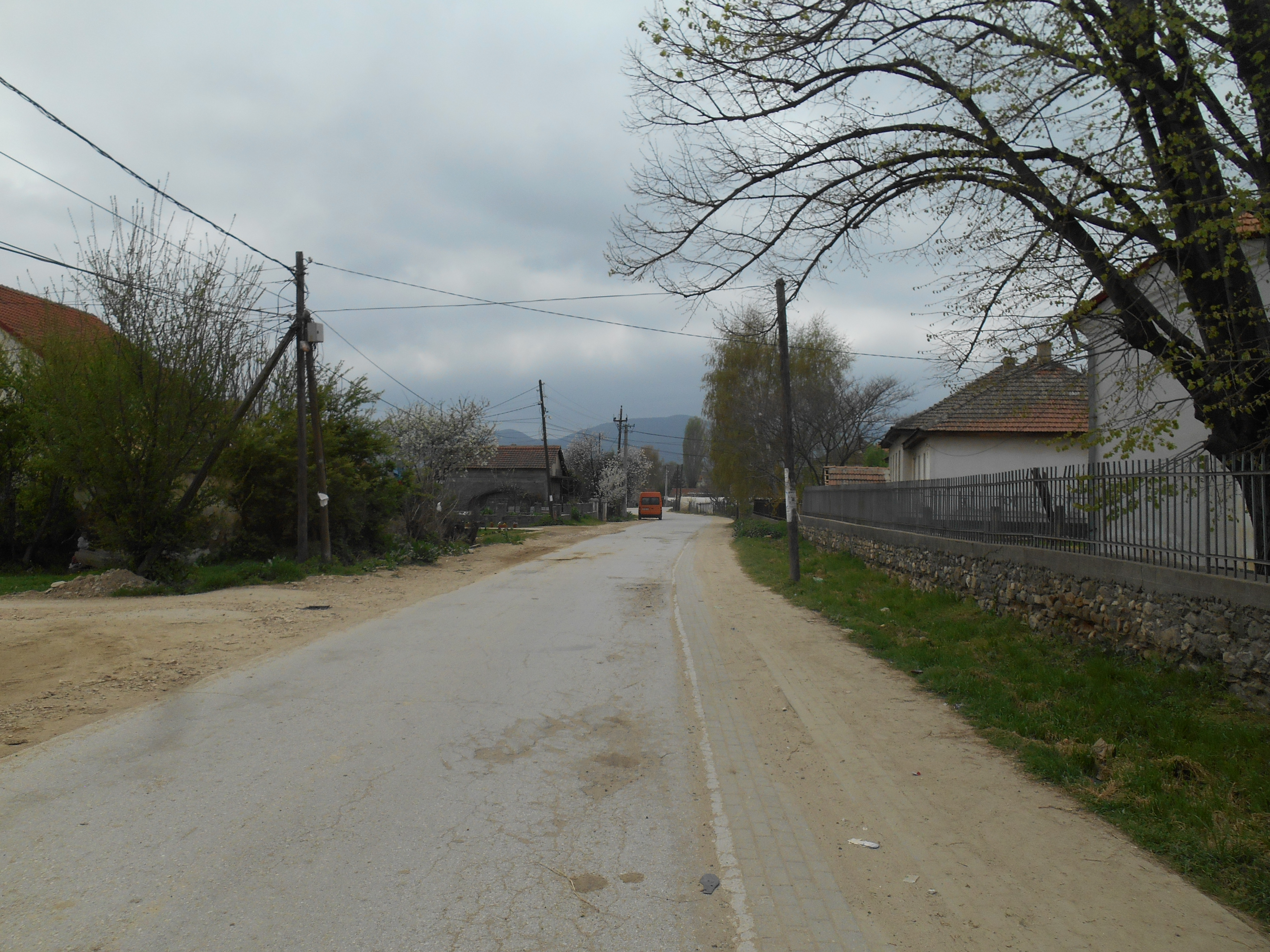 Добрејци - Струмица